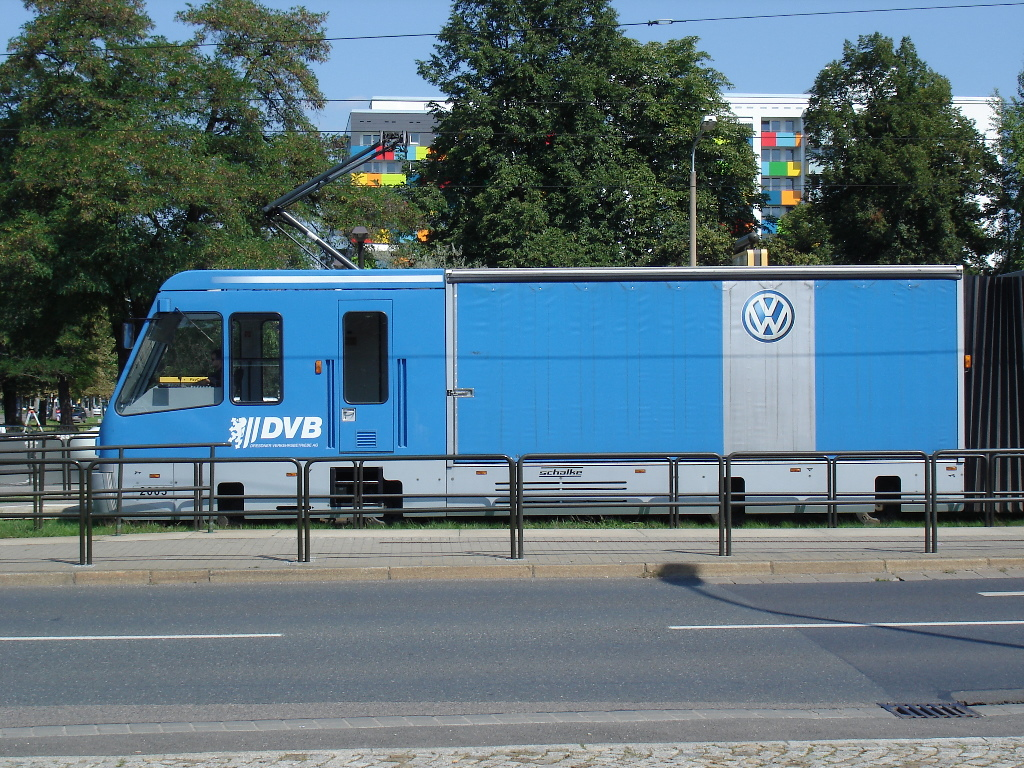 Die CargoTram in Dresden hat gerade die Gläserne Manufaktur von VW verlassen.